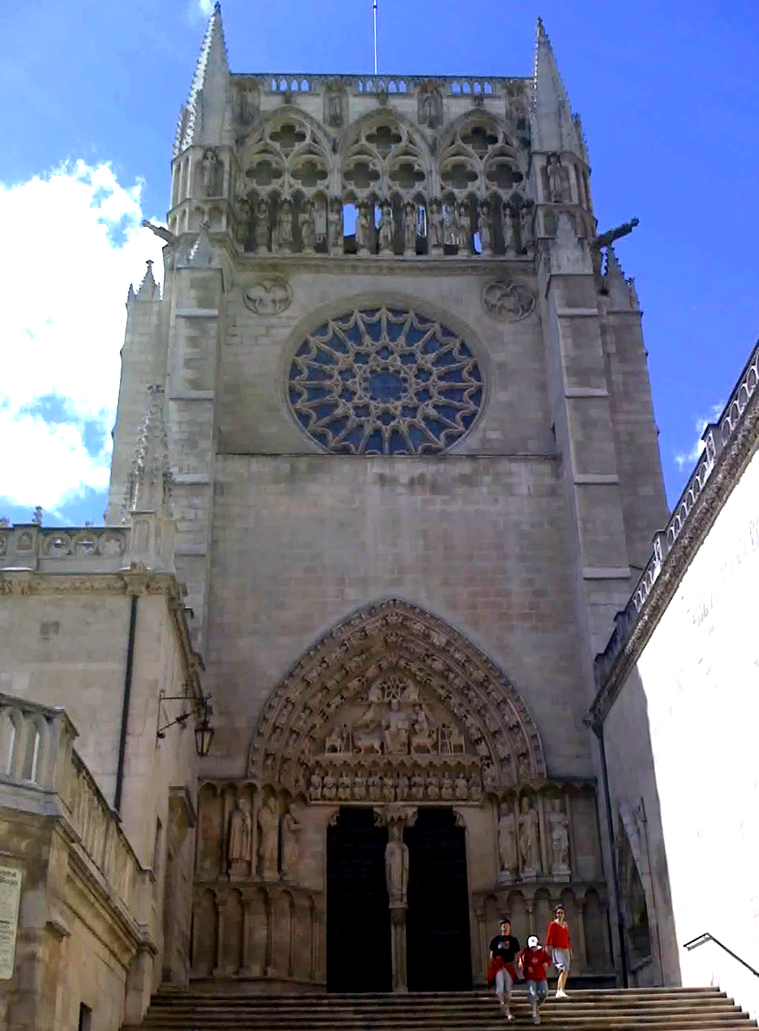 Catedral de Burgos, Puerta del Sarmental